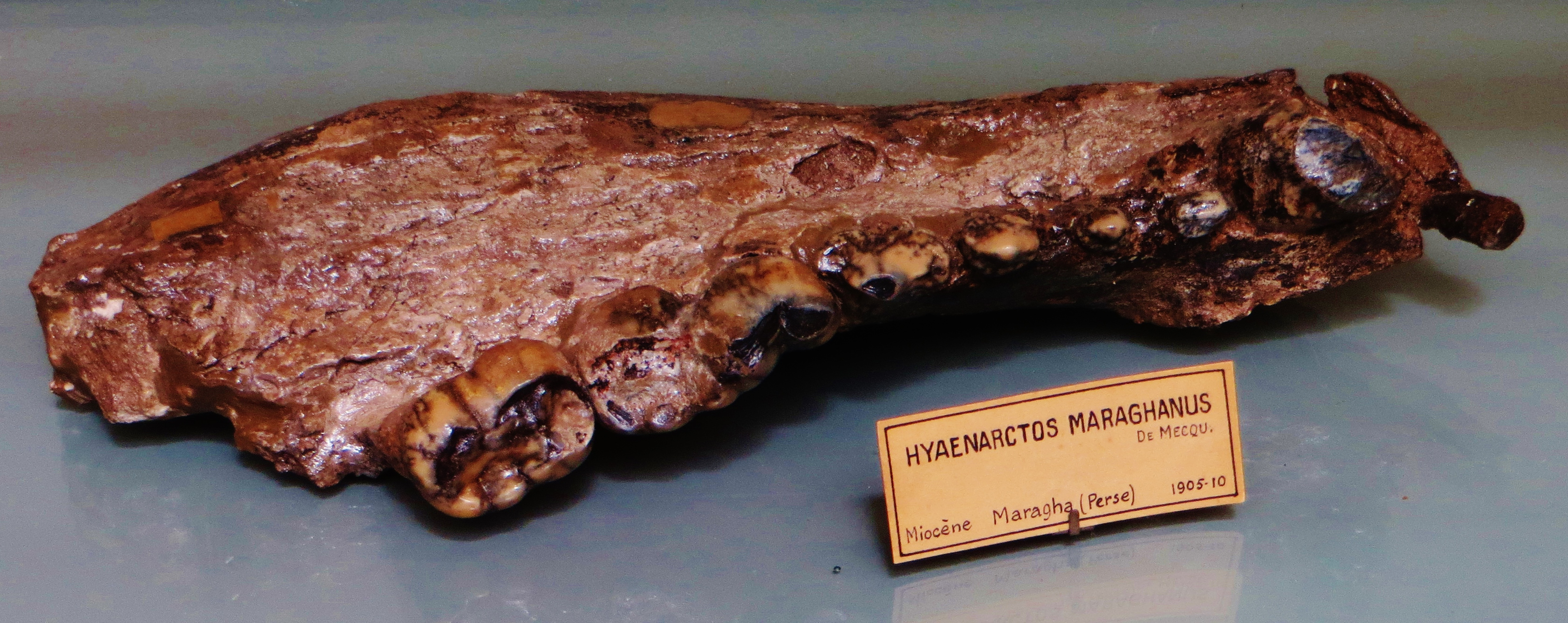 Fossil of Agriotherium, an extinct mammal- Took the photo at Musee d'Histoire Naturelle, Paris